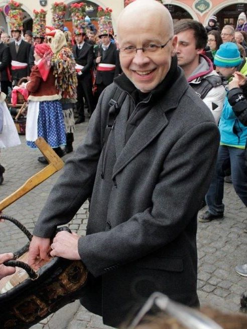 Předseda HOPB Ivo Moravec v únoru 2017 během masopustu na náměstí Přemysla Otakara II. v Českých Budějovicích.